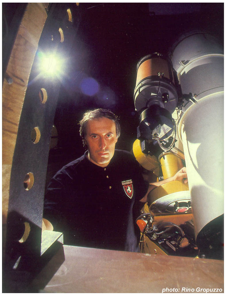 Korado Korlević, hrvatski astronom